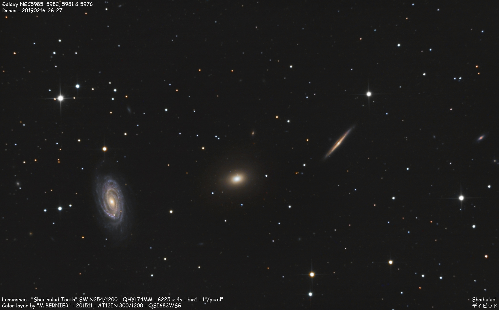 Galaxy NGC5985, 5982, 5981 & 5976